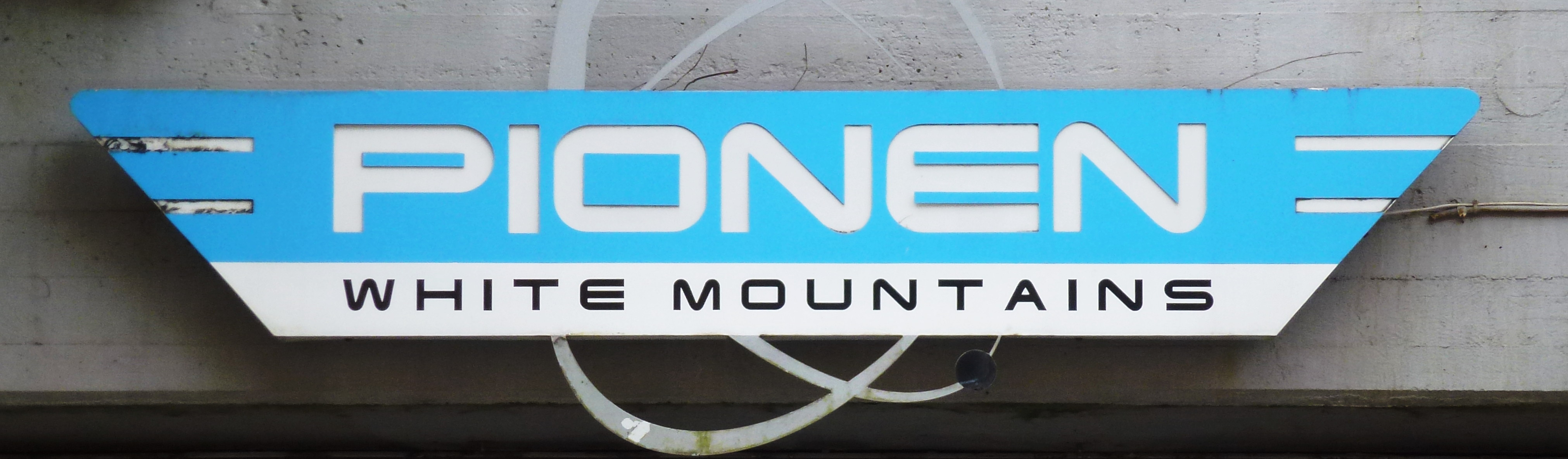 Pionen skylt